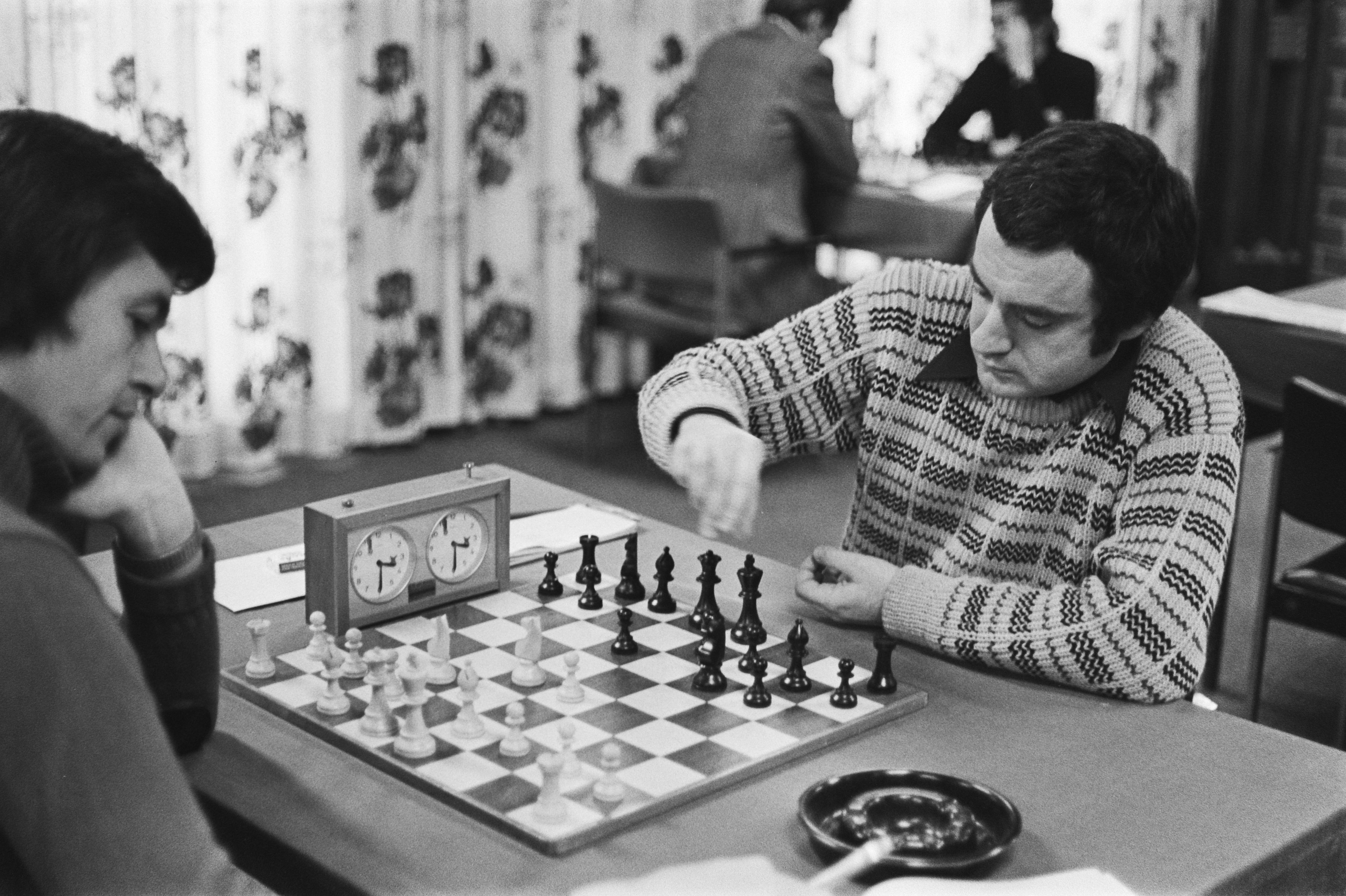 Collectie / Archief : Fotocollectie Anefo Reportage / Serie : [ onbekend ] Beschrijving : Hoogovenschaaktoernooi, Wijk aan Zee ; Gudmundur Sigurjonsson vs. Gennadi Sosonko Datum : 24 januari 1977 Locatie : Noord-Holland, Wijk aan Zee Trefwoorden : schaken, toernooien Instellingsnaam : Hoogovenschaaktoernooi Fotograaf : Suyk, Koen / Anefo Auteursrechthebbende : Nationaal Archief Materiaalsoort : Negatief (zwart/wit) Nummer archiefinventaris : bekijk toegang 2.24.01.05 Bestanddeelnummer : 928-9946